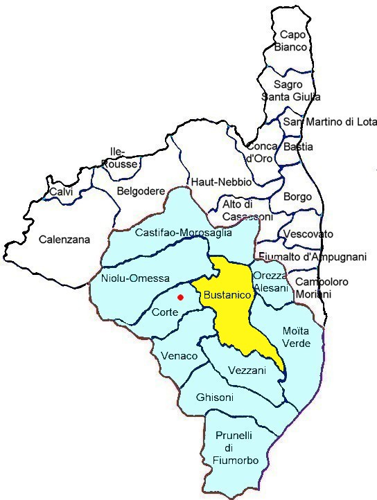 Canton de Bustanico, Haute-Corse. Canton électoral actuel en Casatagniccia s’étendant sur toute ou partie des pievi de Vallerustie, Tàlcini, Boziu, Mercuriu, et Rogna. Regroupe électoralement les anciens cantons de San Lurenzo, Sarmanu et Piedicorte-di-Caggio. Corsu: Ghjura eletturale in Castagniccia cu e pievi di Vallerustie, Boziu, Mercuriu, Tàlcini, è Rogna di fiume in quà. Vecchji cantoni di Sa’Lurenzu, Sermanu, è Pedicorti.